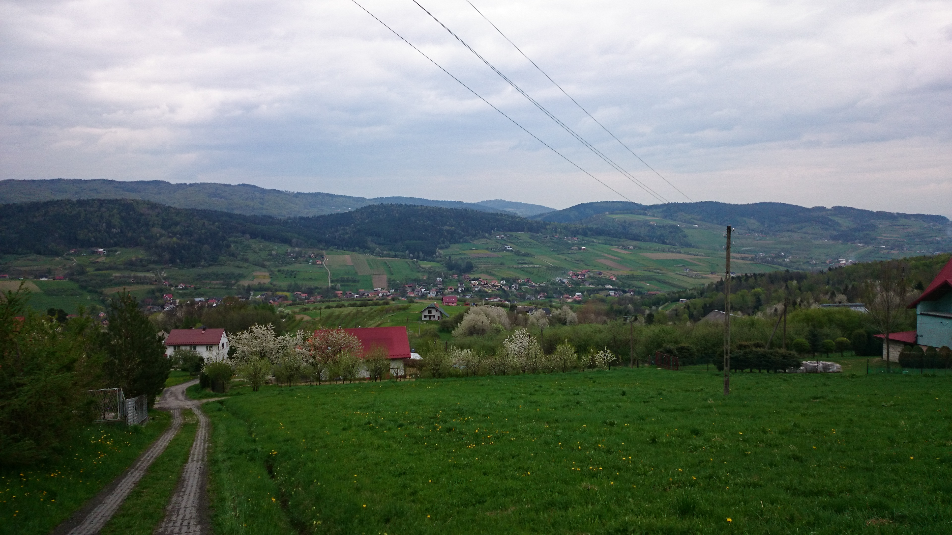 Widok na Zagorzyn z Byniowej.